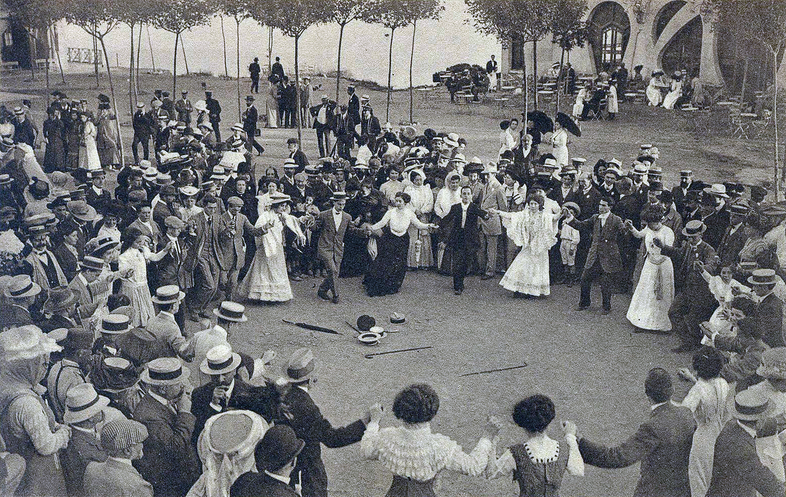 La rondo, danco esperantista / 5a Internacia Kongreso, 5-11 septembro 1909, Barcelona